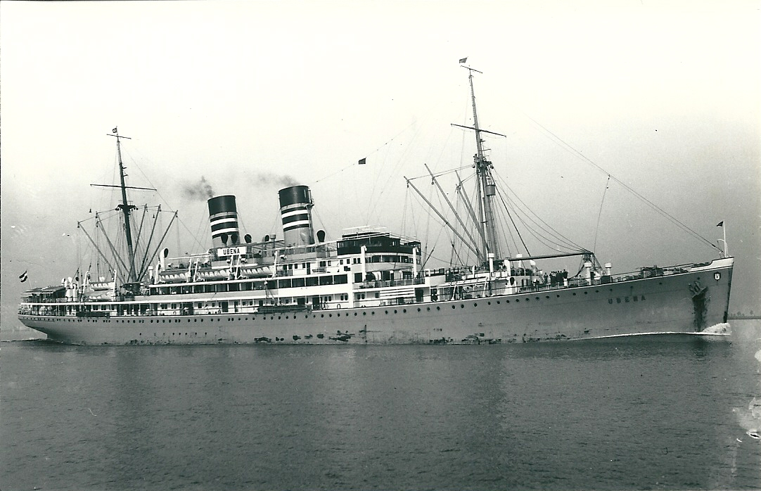 Der deutsche Afrika-Liner Ubena der DOAL